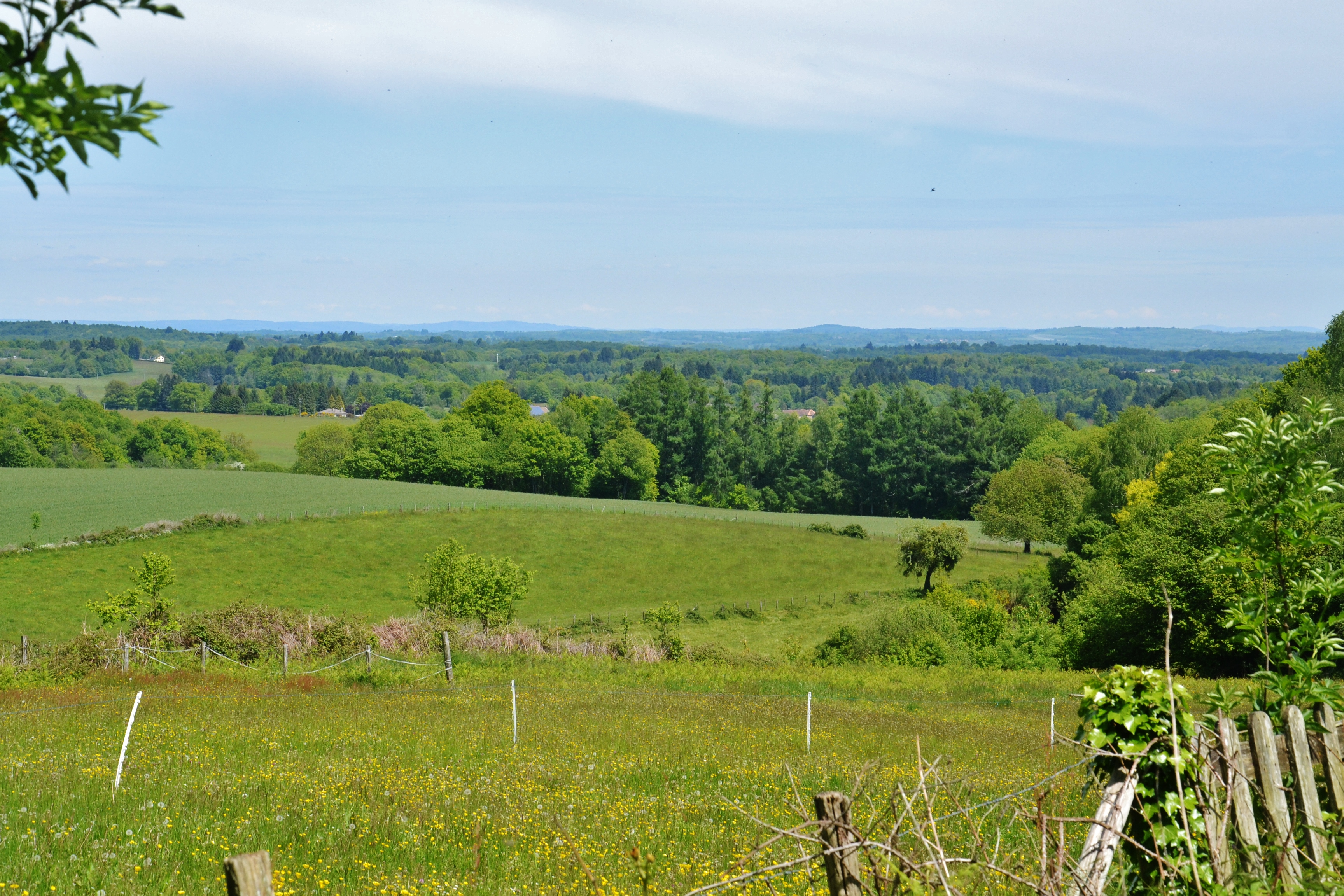 Vue sur le plateau limousin, les monts de Fayat et la montagne limousine depuis Saint-Nicolas-Courbefy (Bussière-Galant, Haute-Vienne, France)